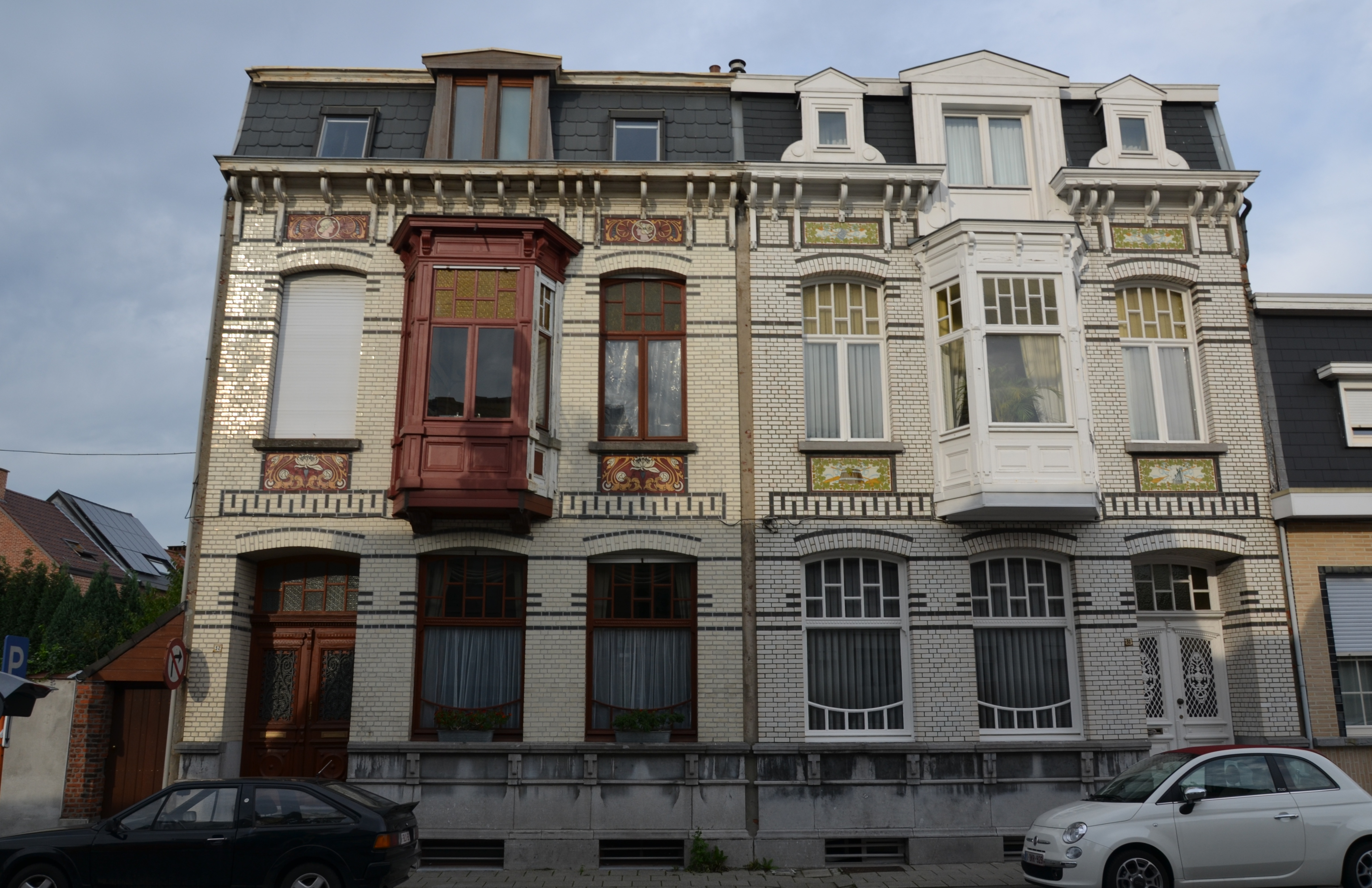 Ensemble van 2 burgerhuizen in de Guido Gezellestraat, Aartselaar; de huizen staan op de erfgoedlijst onder nummer 12428